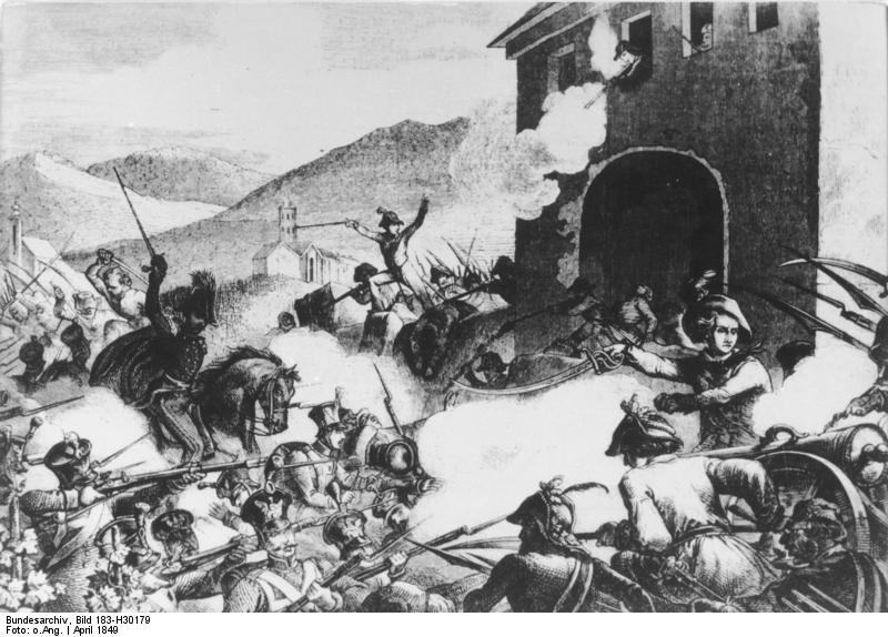 Zentralbild Revolution 1848/49 in Deutschland 1. republikanischer Aufstand in Baden, April 1848. Die badischen Republikaner verteidigen am 24.4.1848 Freiburg im Breisgau gegen südwestdeutsche Truppen.